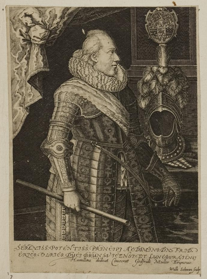 Grafik aus dem Klebeband Nr. 1 der Fürstlich Waldeckschen Hofbibliothek Arolsen Motiv: Friedrich Ulrich, Herzog von Braunschweig-Lüneburg